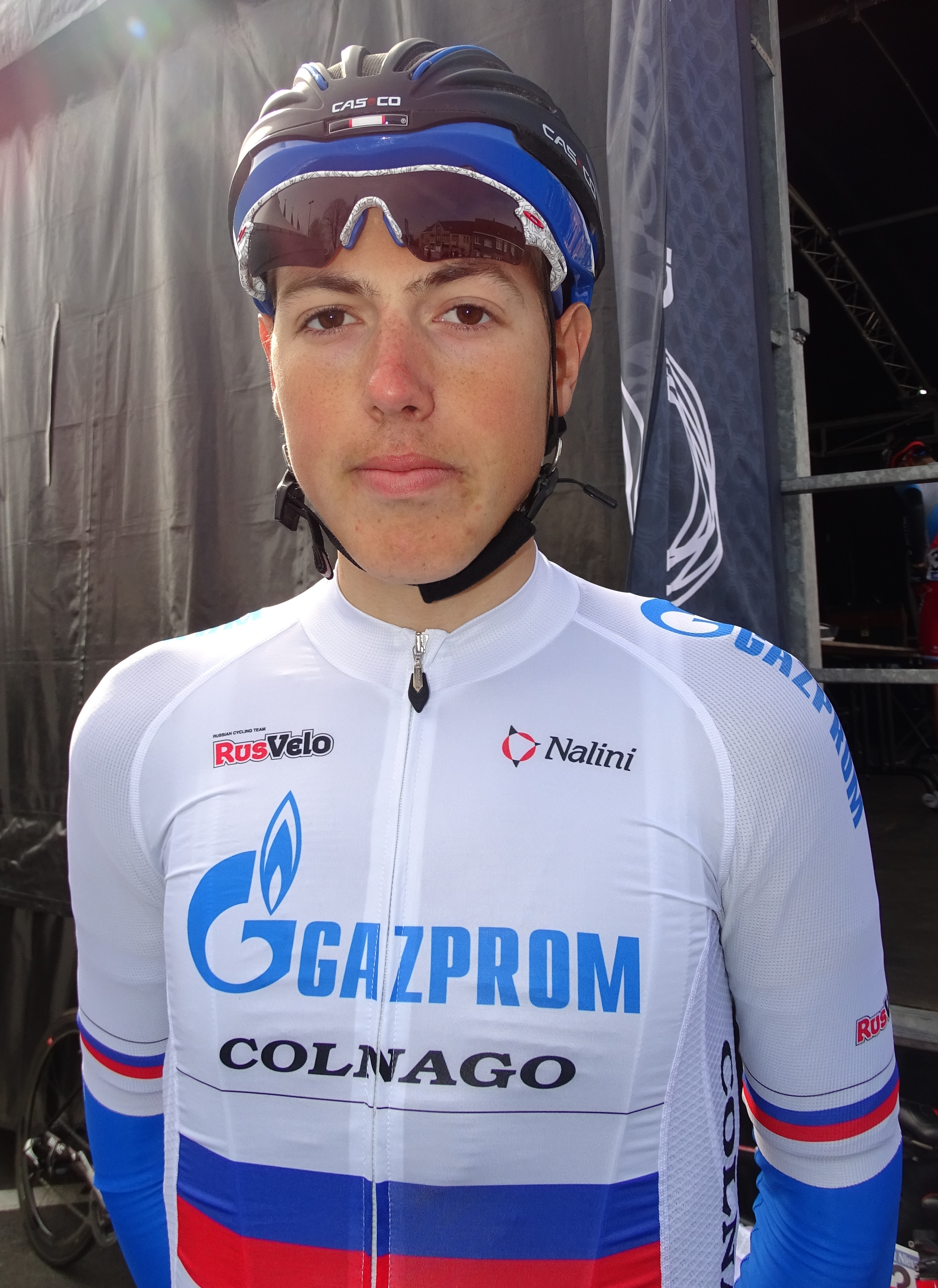 Reportage réalisé le samedi 9 avril à l'occasion du départ et de l'arrivée du Tour des Flandres espoirs 2016 à Audenarde, Belgique.